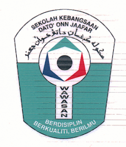 Logo